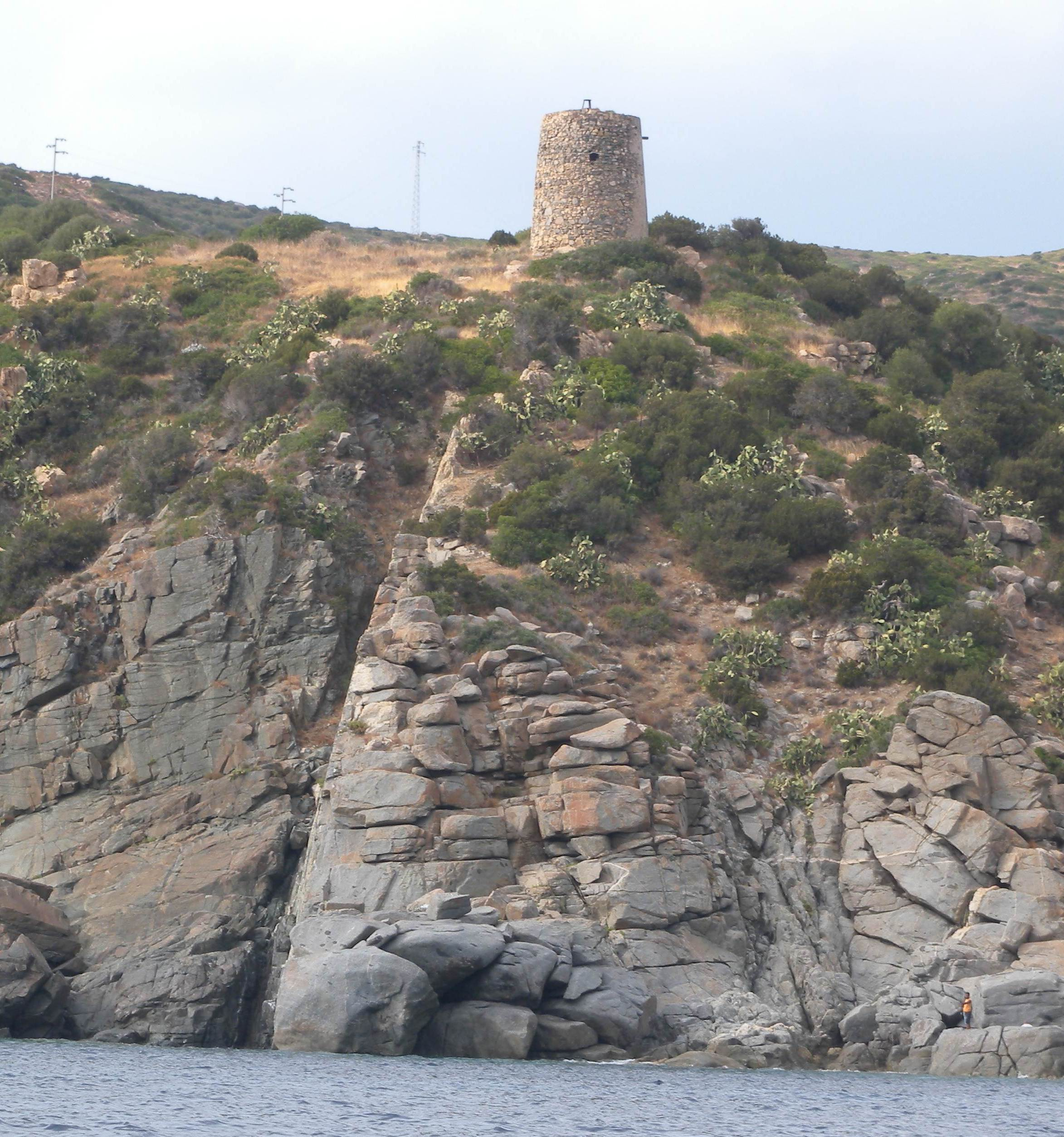 Torre costiera della Sardegna